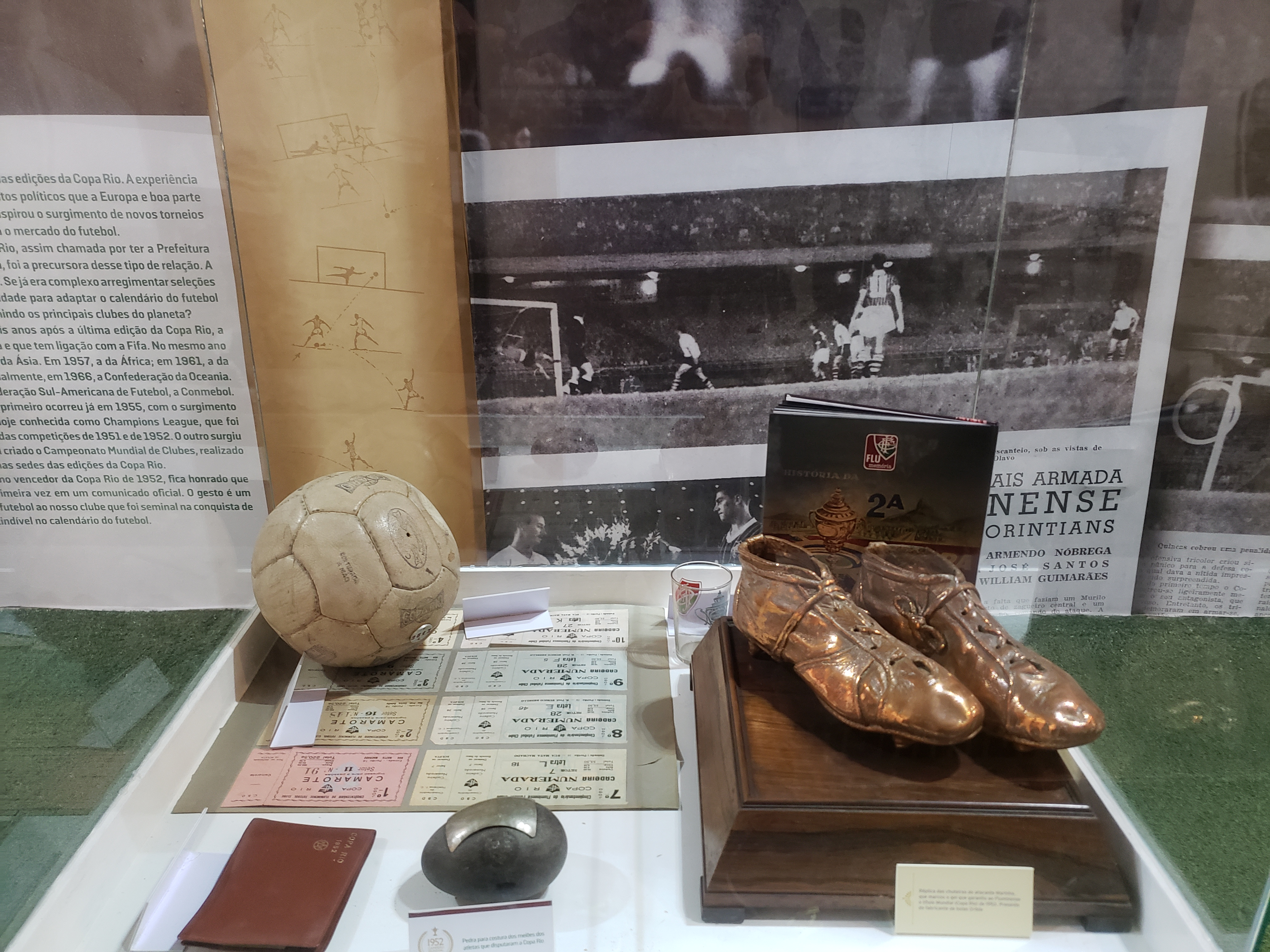 Objetos históricos relacionados à conquista da Copa Rio de 1952 pelo Fluminense Football Club em exposição na Sala de Troféus do clube..